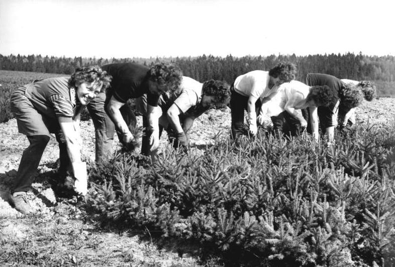 Zillbach, Ernte von Fichten, Baumschule ADN-ZB Schaar 15.5.1984 pe Bez. Suhl: Zur Zeit ist die Ernte fünfjähriger Fichten in der Forstbaumschule Zillbach (Staatlicher Forstwirtschaftsbetrieb Meiningen) im Gange. Die Forstarbeiter werden dabei von freiwilligen Helferinnen aus der Umgebung unterstützt. Die jungen Bäumchen sind für die Aufforstung in den Thüringer Wäldern bestimmt. (siehe auch 7 N)